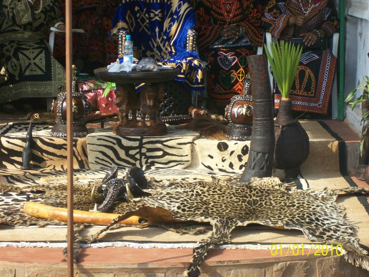 Batibo Palace